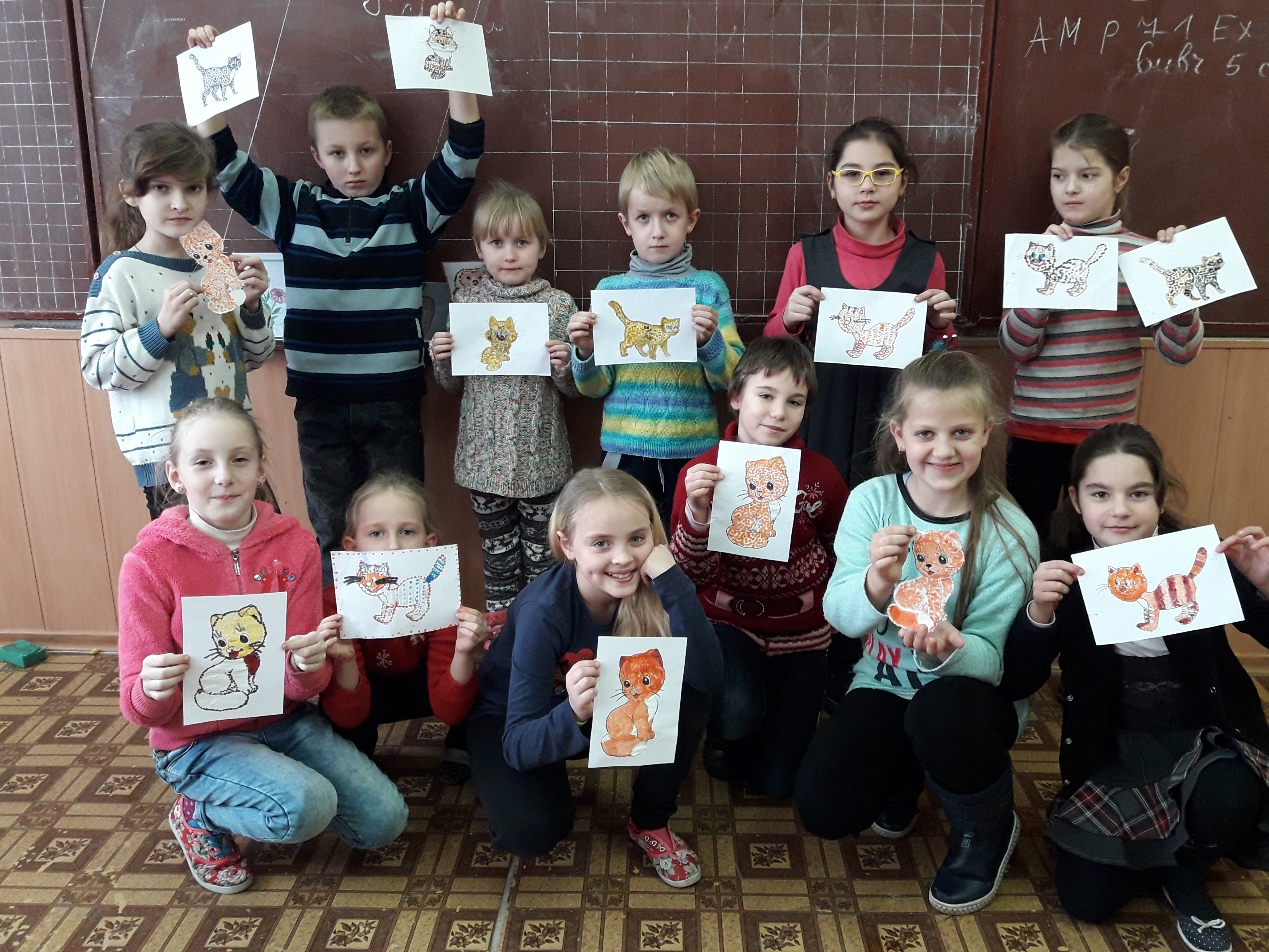 ми з гуртківцями дуже любимо малювати